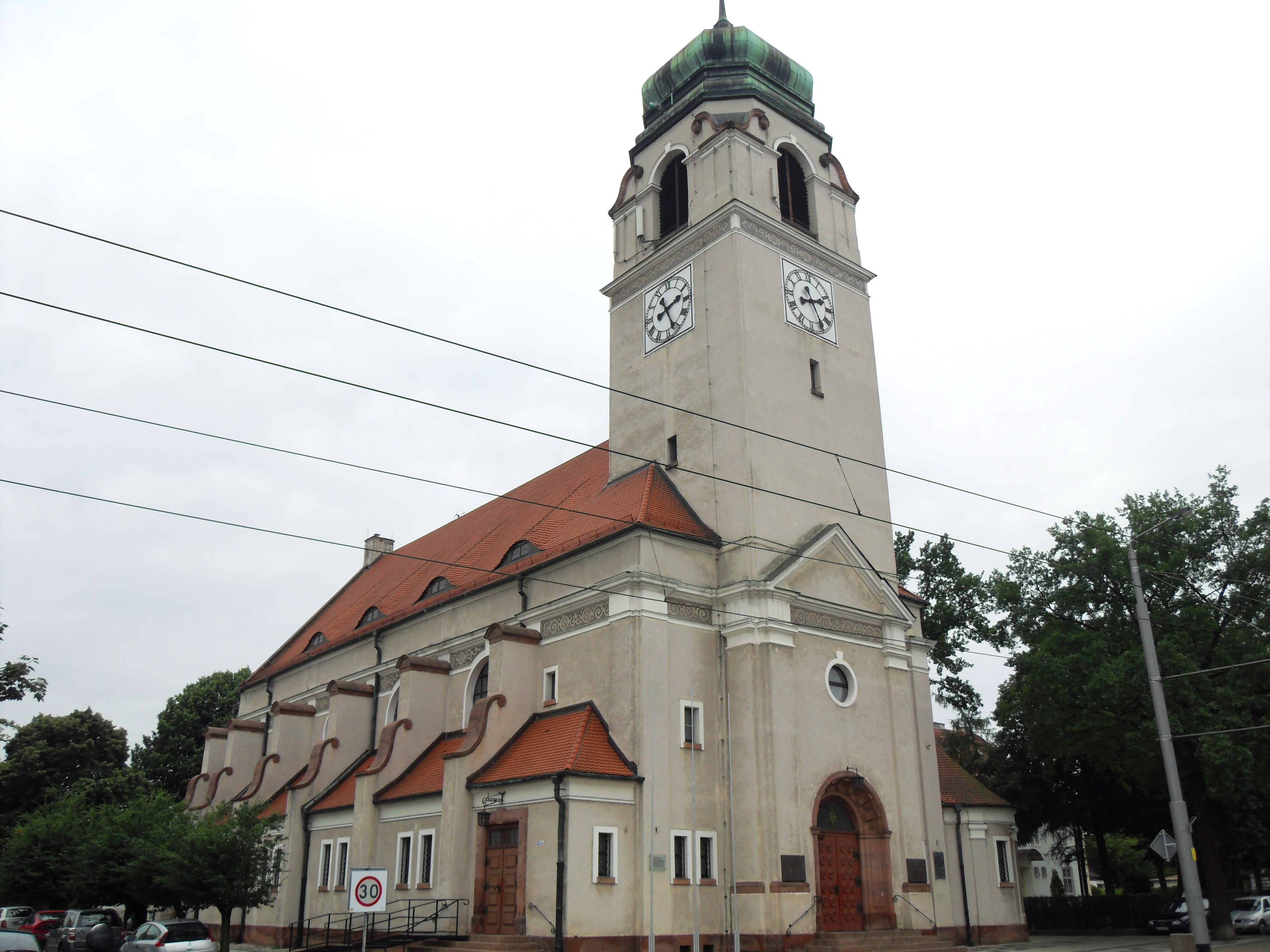 Gdańsk Wrzeszcz Dolny, ul. Mickiewicza 11 - dawny kościół ewangelicki, obecnie rzymskokatolicki parafialny p.w. św. Andrzeja Boboli, 1914-1916